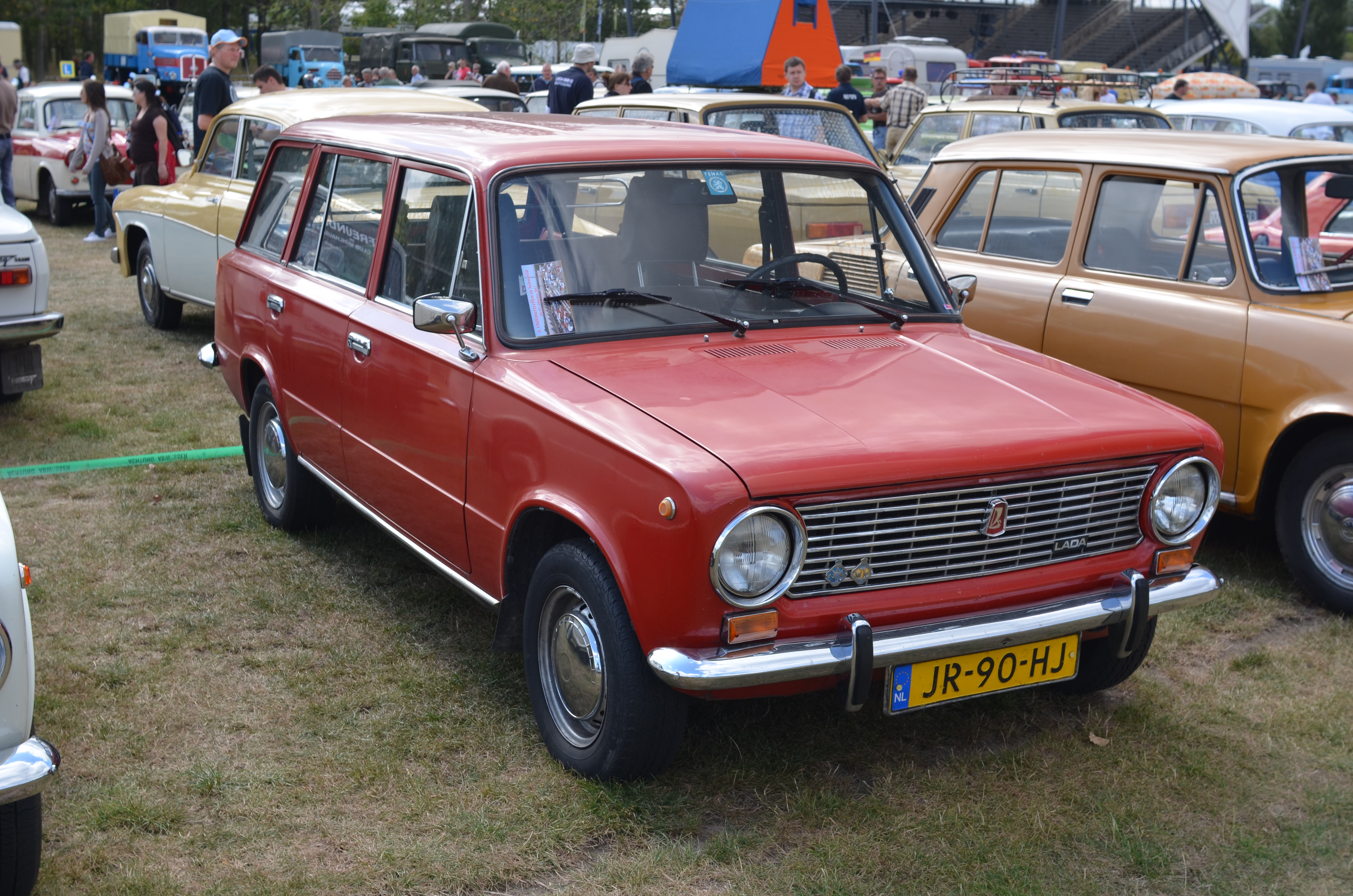 Lada 1200 Combi